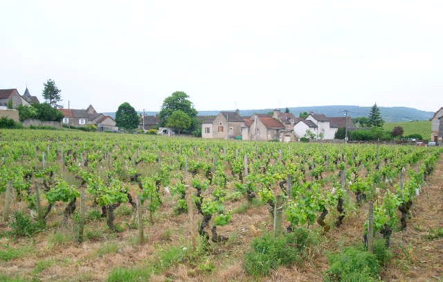 Vue de En Grillot